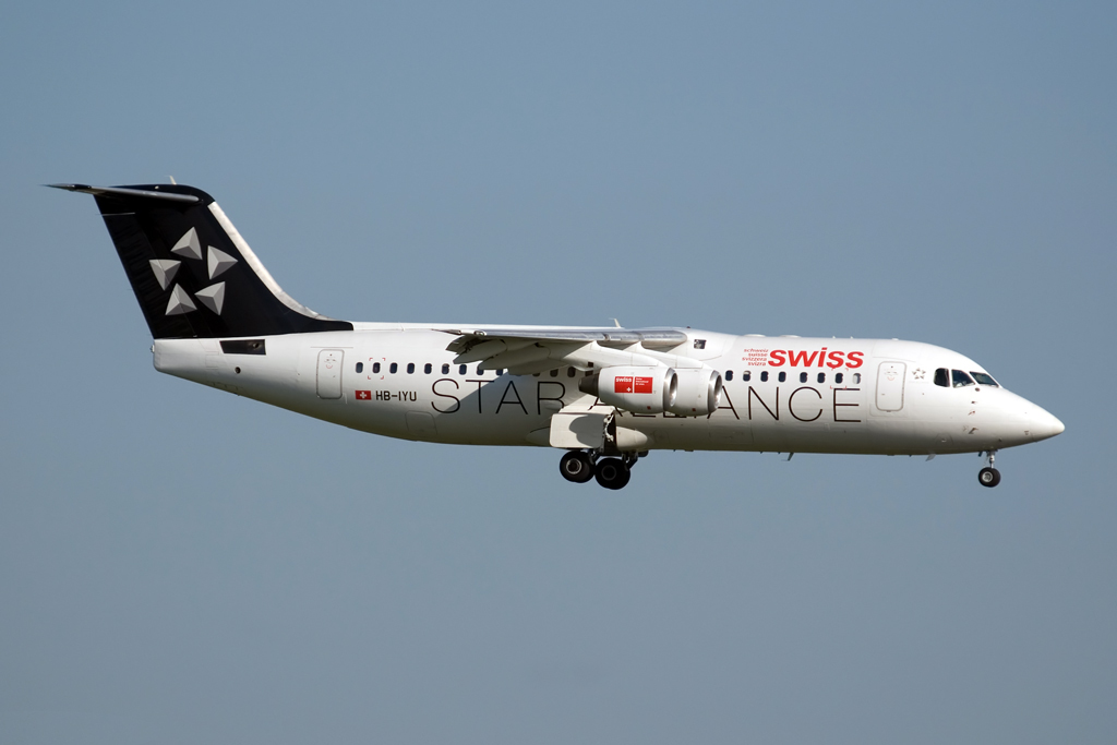 BAE Systems Avro 146-RJ100 Amsterdam schiphol [AMS / EHAM] 31-05-2009